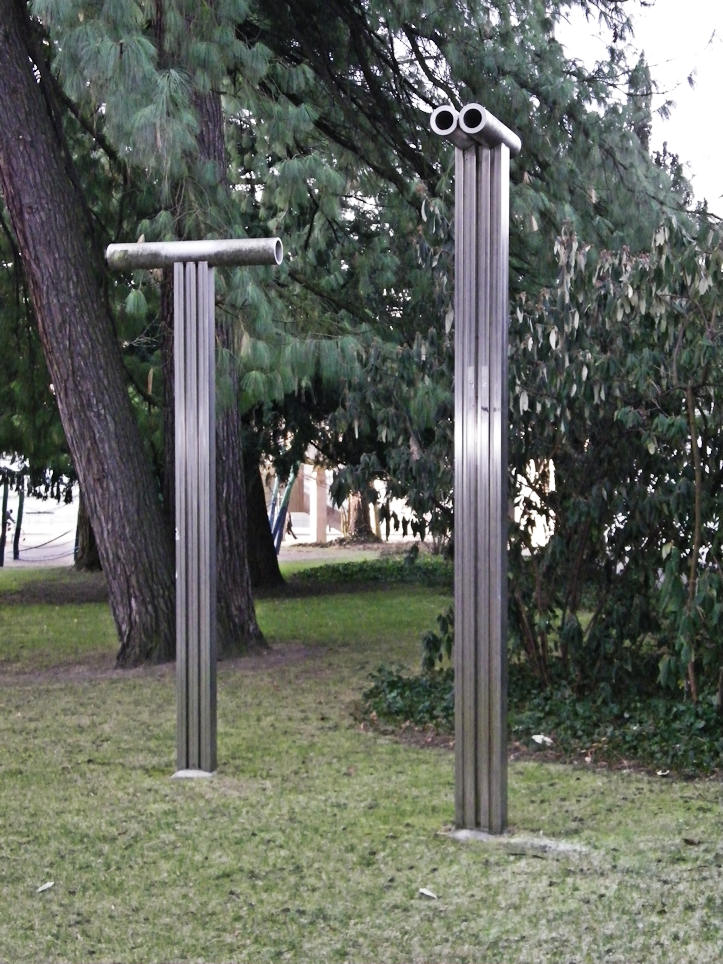 Die Metallplastiken stellen in abstrahierter Form "Augen- und Ohren-Menschen" dar. Sinnbilder für kanalisiertes, eingeschränktes Sehen und Hören.